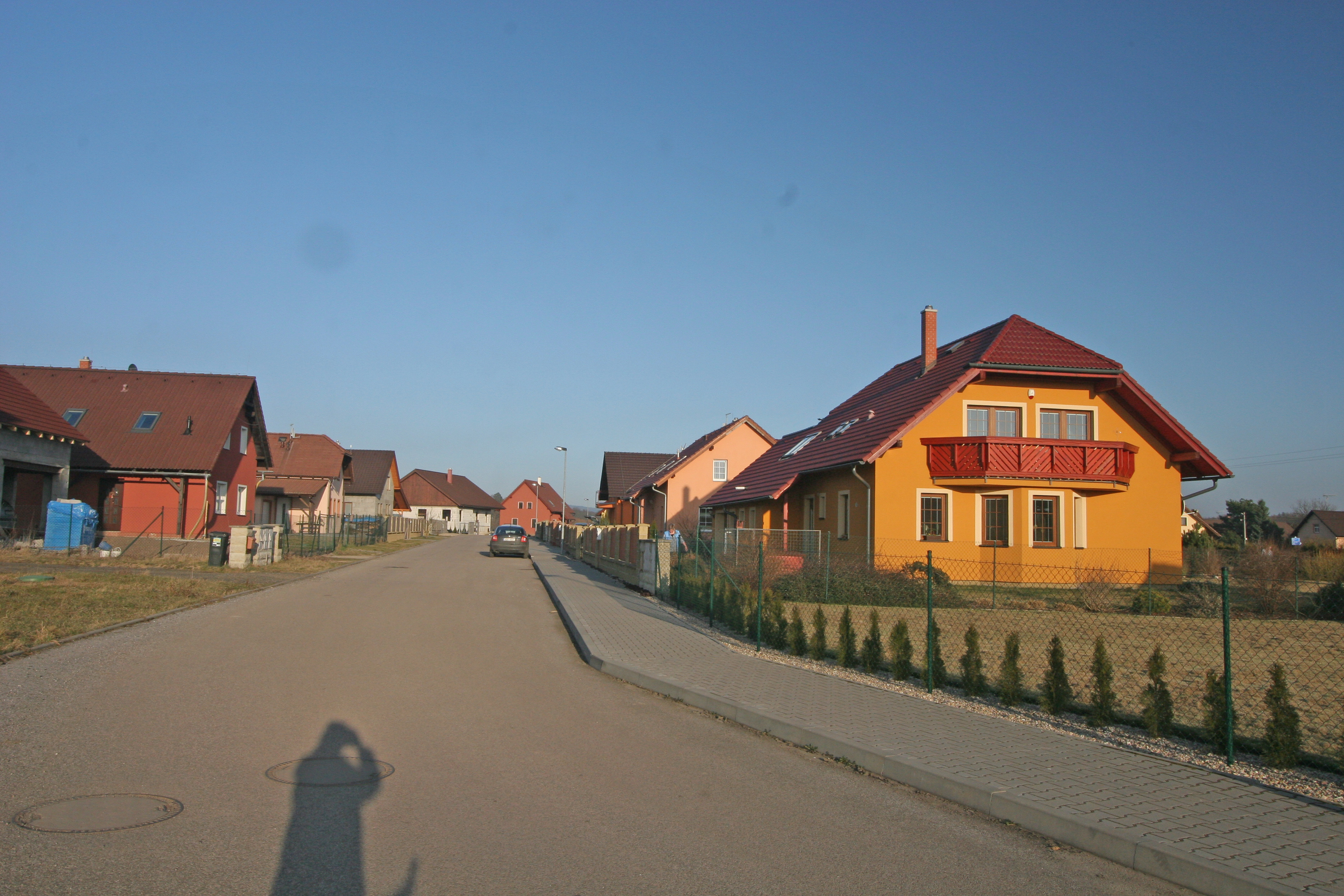 Butoves novostavby